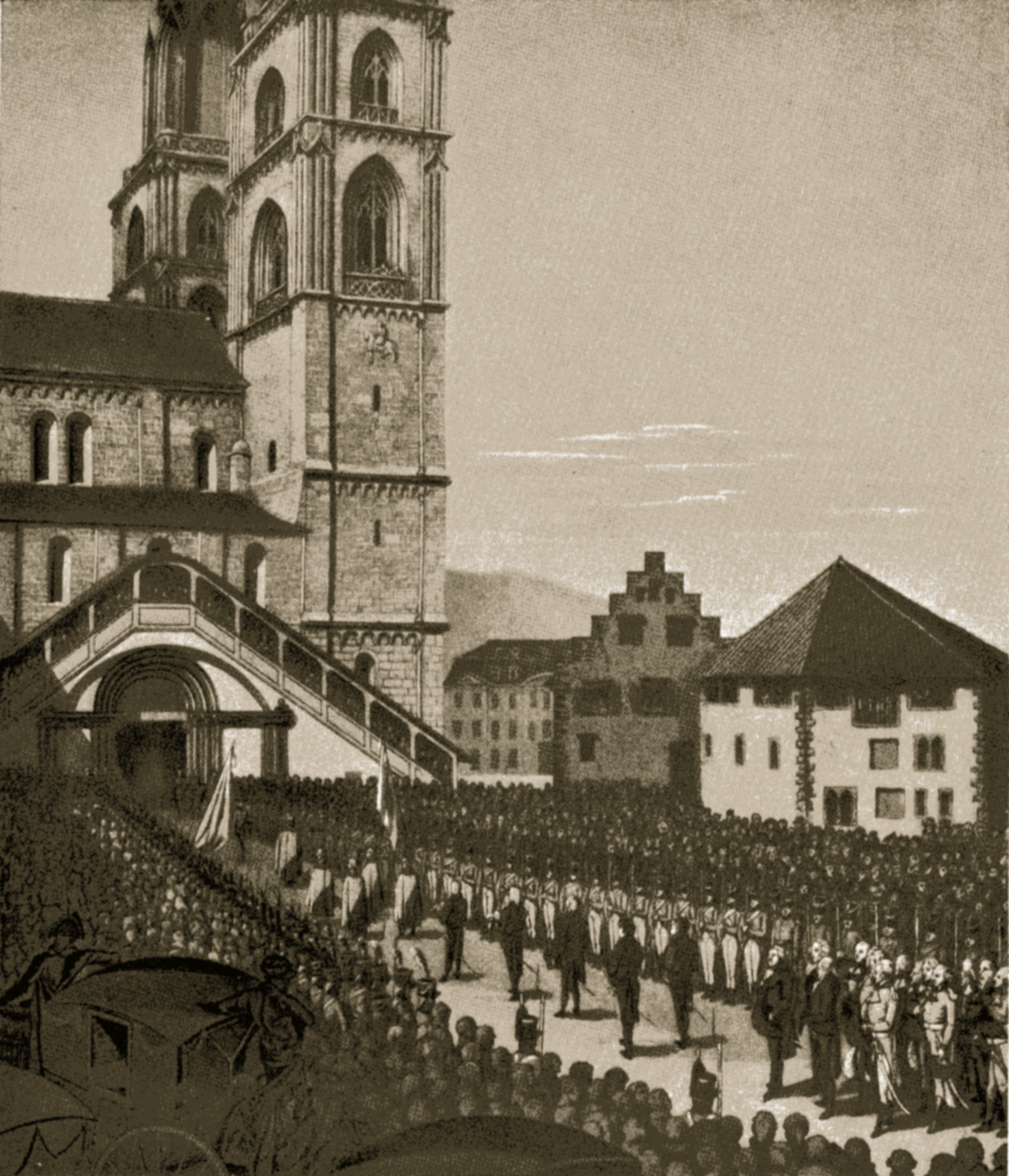 Einzug der Tagsatzung ins Grossmünster. Das Bild stammt aus dem Jahr 1807, ist aber typisch für das Zeremoniell auch der spätem Jahrzehnte. Am Grossmünster sieht man noch die hölzernen Treppen über dem Hauptportal.